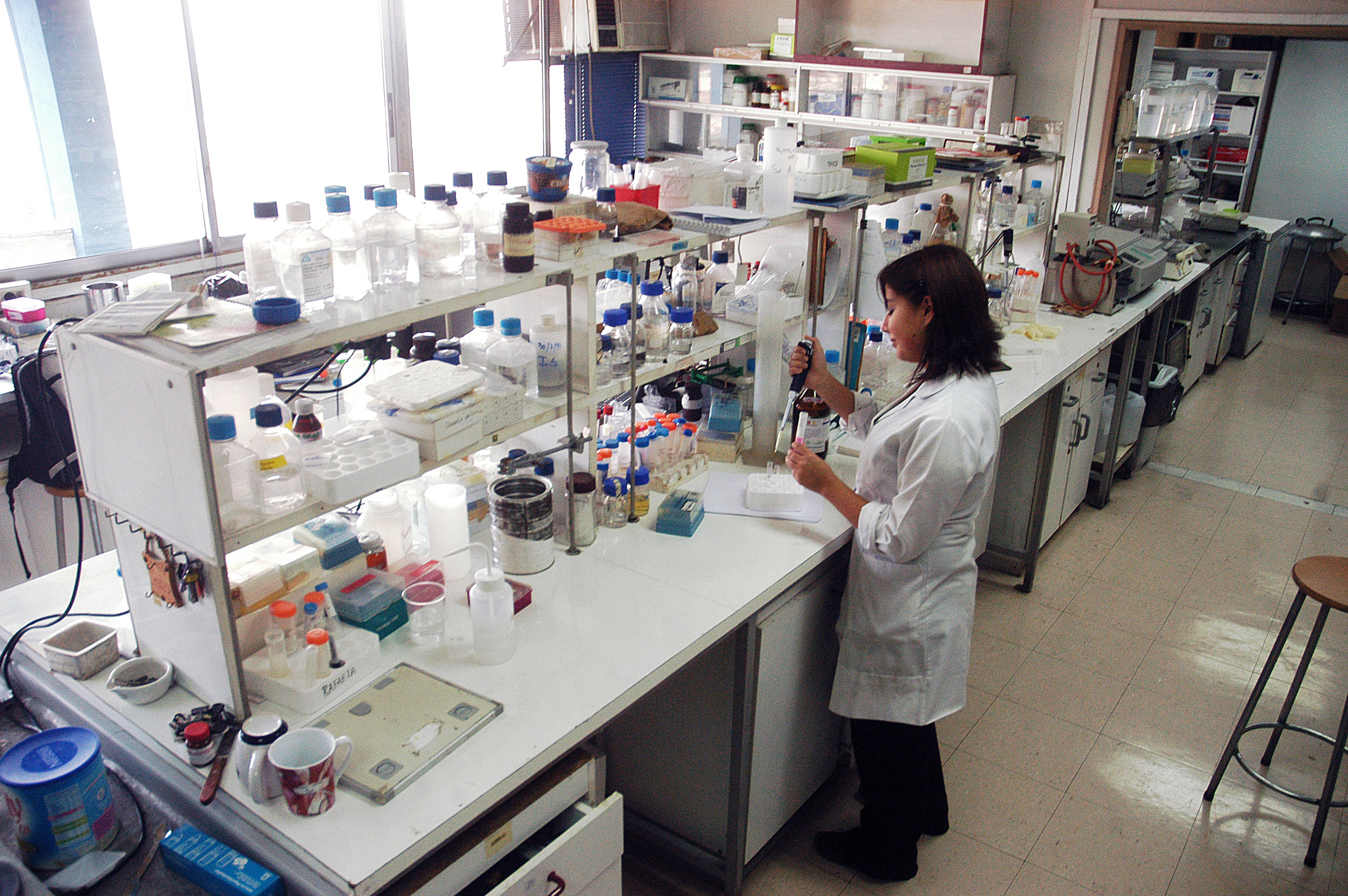 Laboratorio